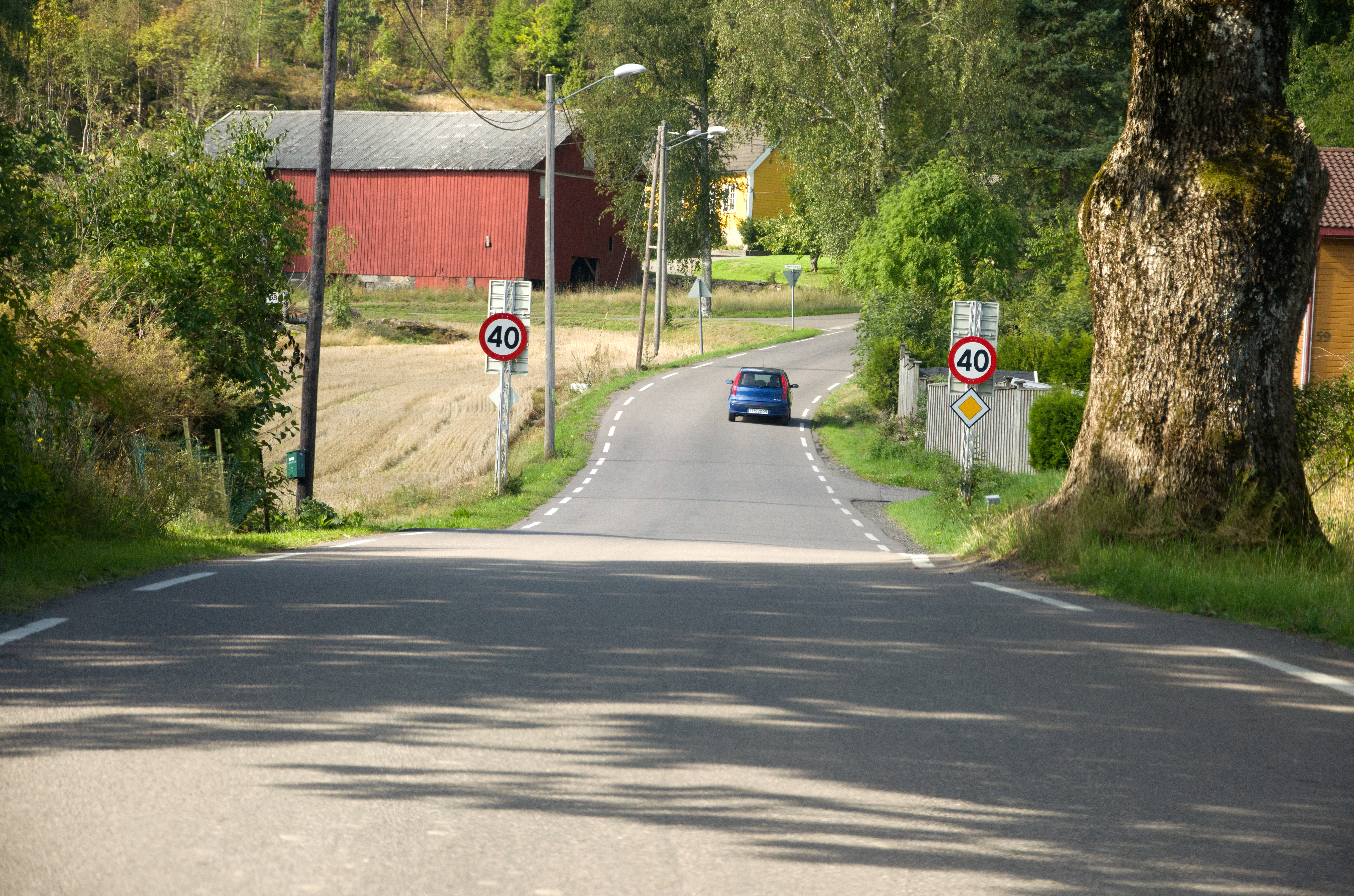 Fylkesvei 415 Torødveien på Nøtterøy i Vestfold